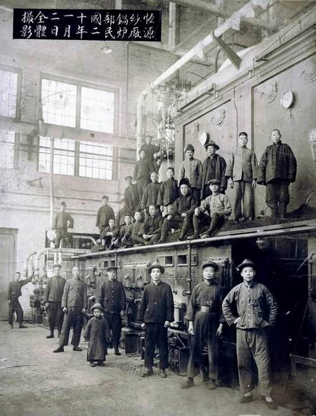 Foto de los trabajadores de la fabrica Hengyuan de Tianjin/Sina.com